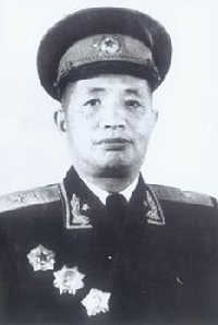 中文（中国大陆）: 李中权少将1955年授衔照